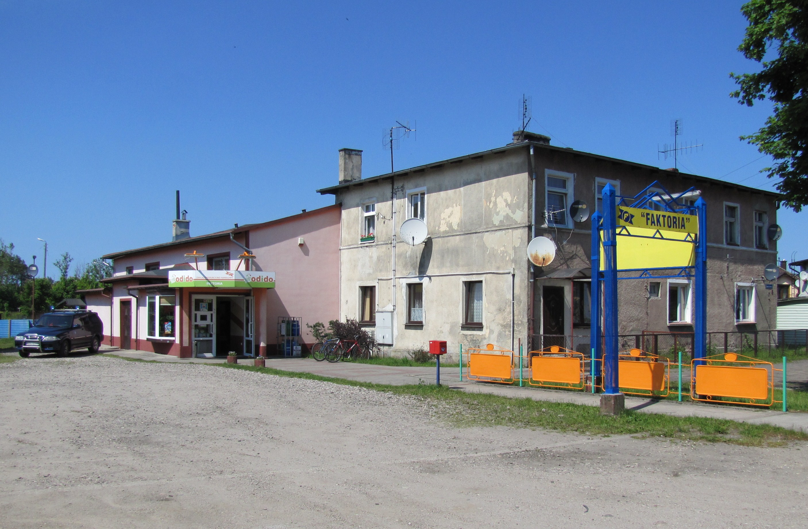 Budynki Osady kolejarskiej.